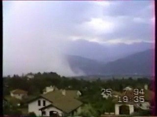 Trombe d'eau s'avançant sur la ville de Domène, près de Grenoble. Vue prise depuis Meylan.